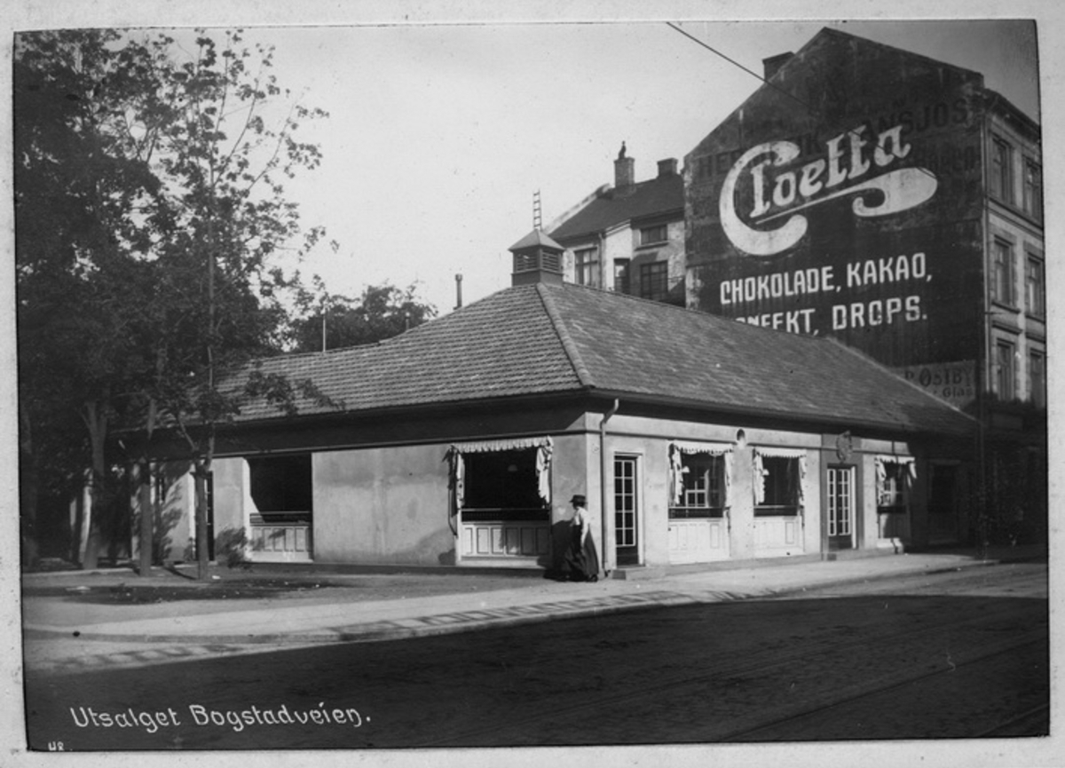 Kommunalt matutsalg i Bogstadveien. Foto: Narve Skarpmoen (1918). Fra samlingen «Provianteringsrådet» hos Oslo byarkiv.